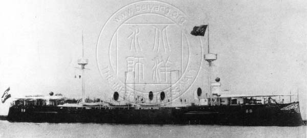 Крейсер "Хай-Чоу". Фото